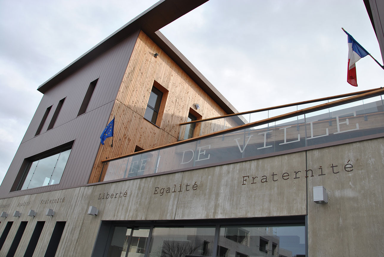 Depuis 2014